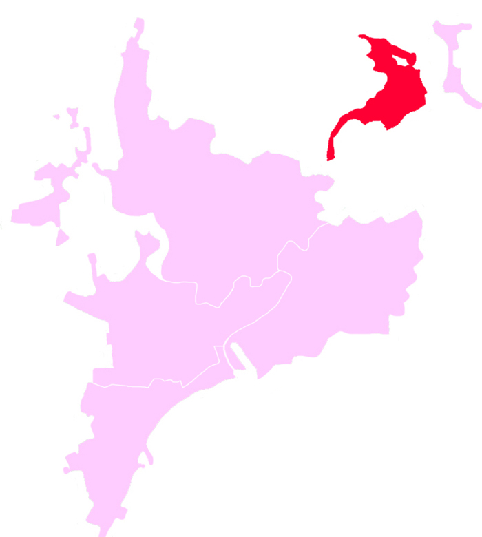 map